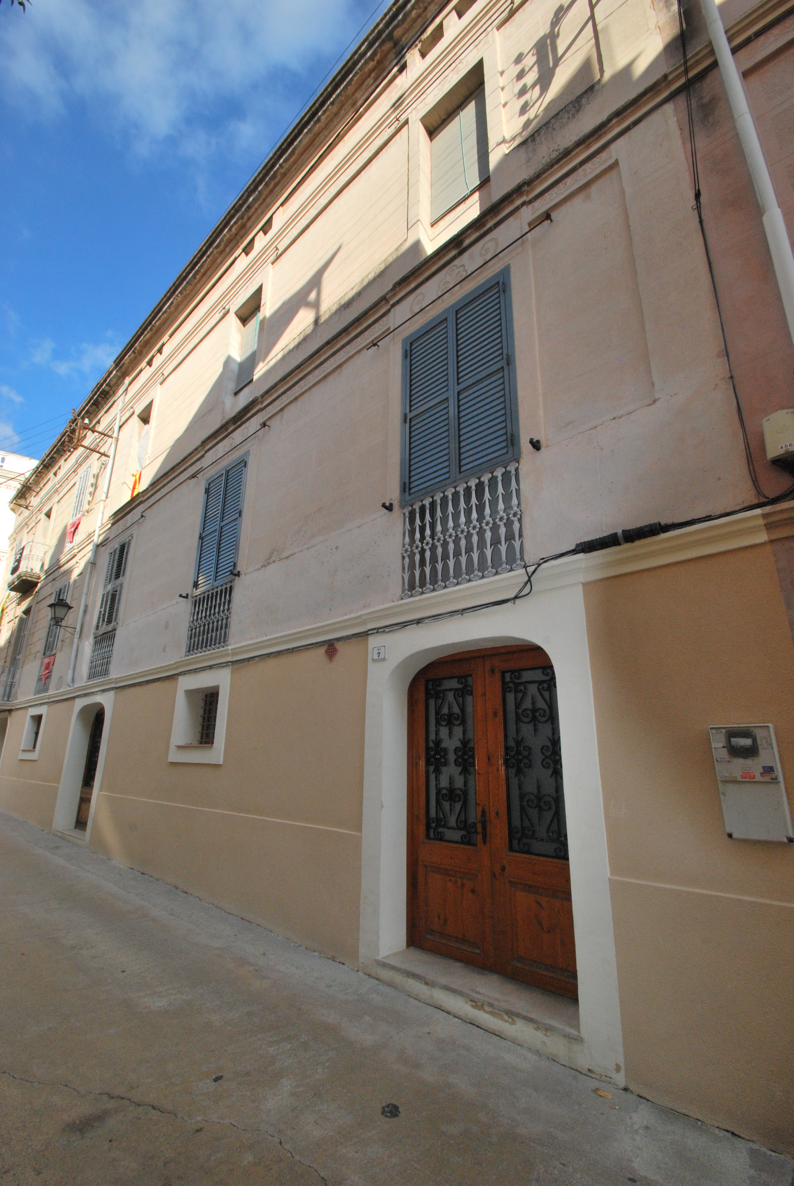 Casa al carrer Jussà, 7 (l'Arboç)